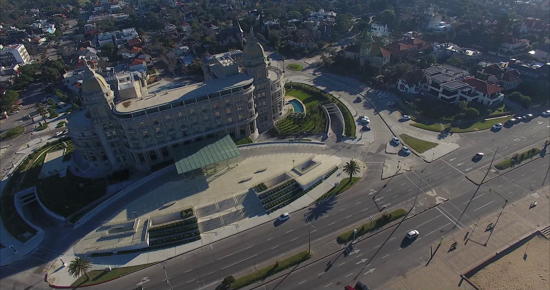 Hotel Carrasco, rambla de Montevideo